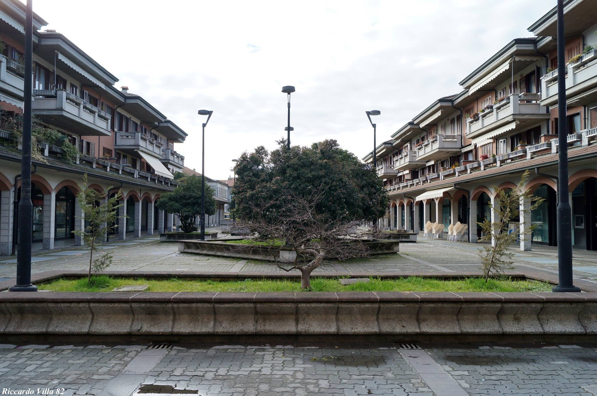 Piazza Enrico Berlinguer a Paullo